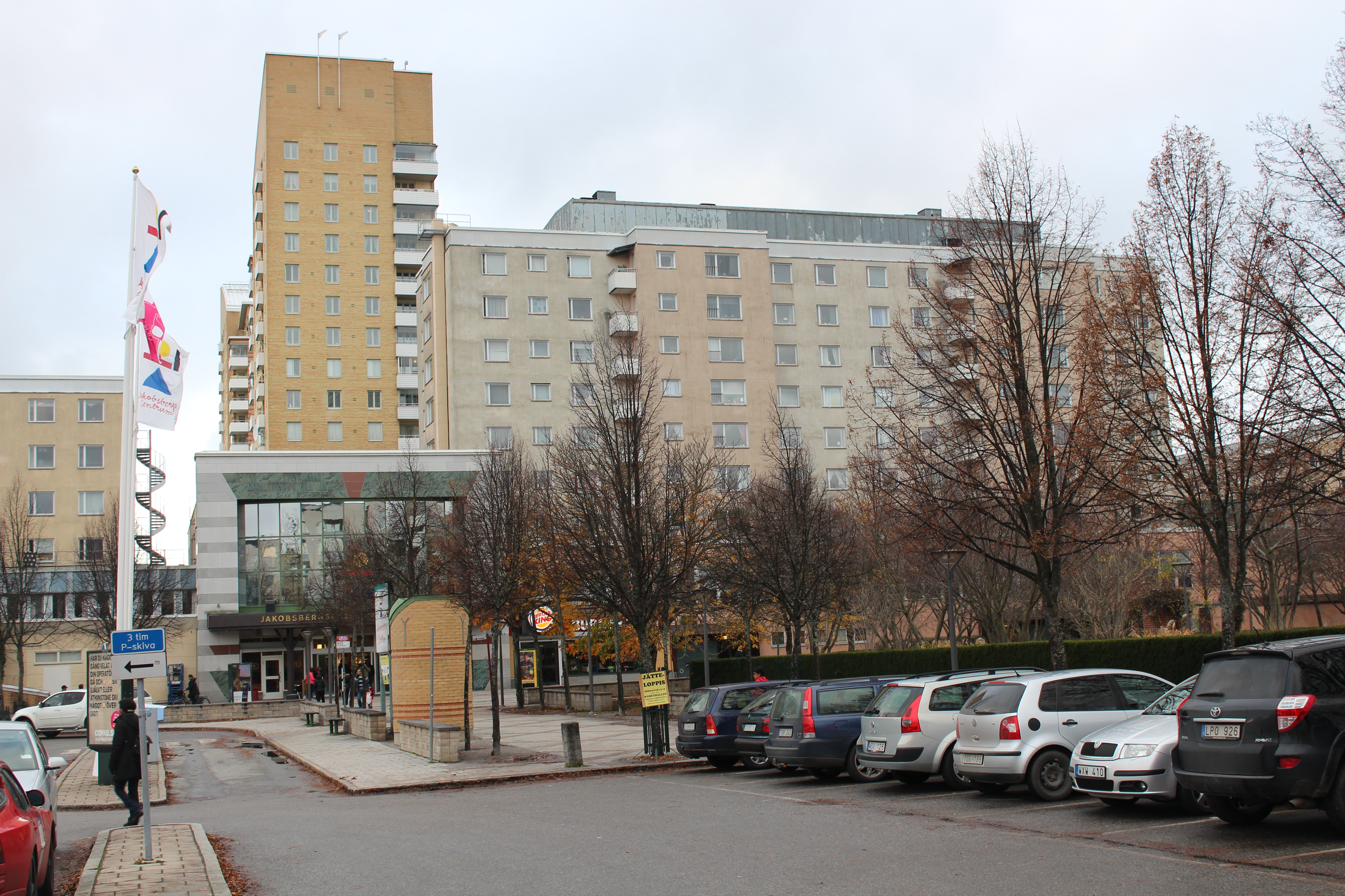 Jakobsbergs centrum